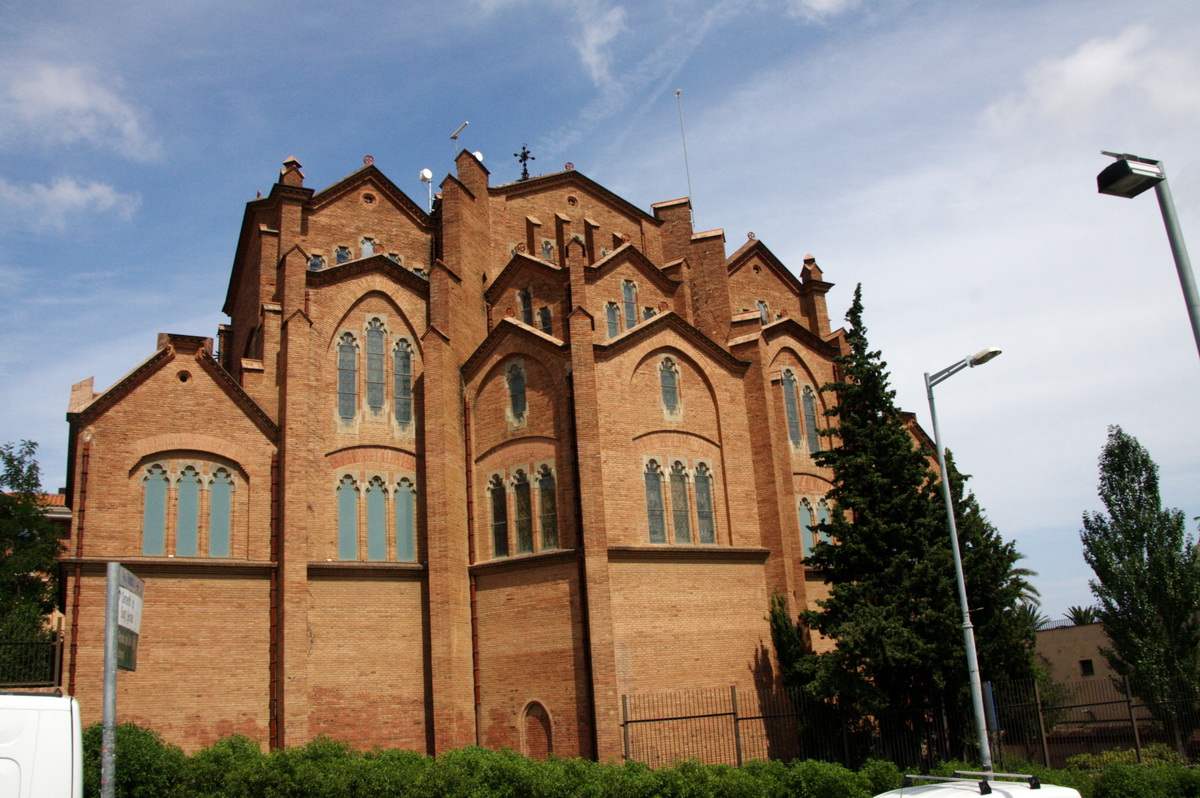 Absis de l'església de l'antic convent del Santíssim Redemptor de Bellesguard, actual seu de la Universitat Abat Oliba (Barcelona - Catalunya), obra de Bernardí Martorell (1922)